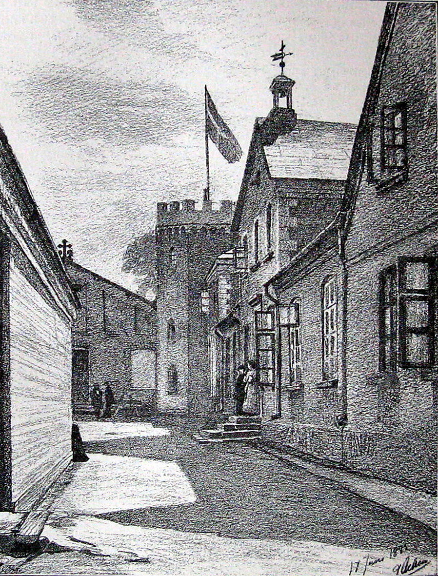 'Dansk: Askov Højskole 1885